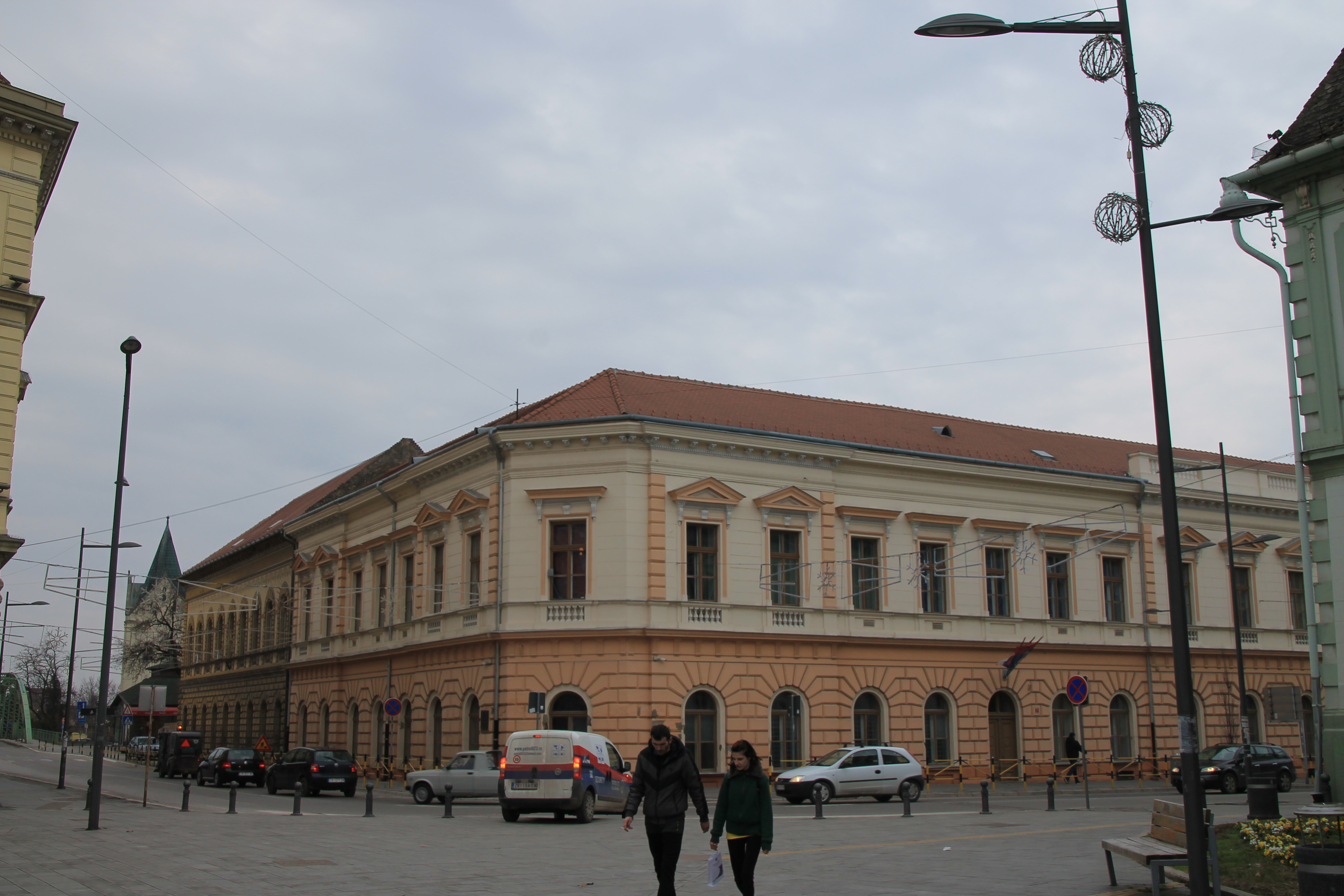 Staro jezgro Zrenjanina